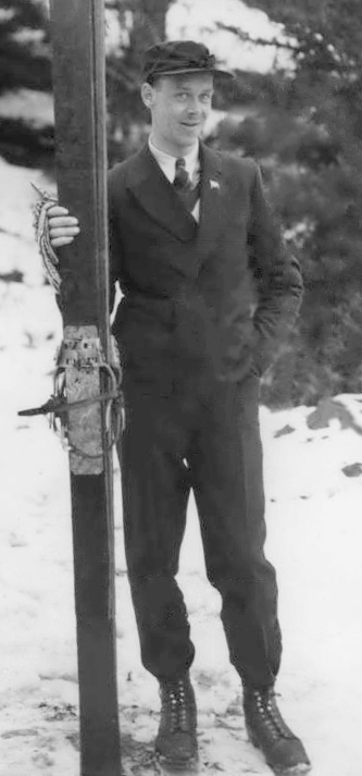 1932 Press Photo Hans Vinjarengen Norwegian Olympic skier - net20544